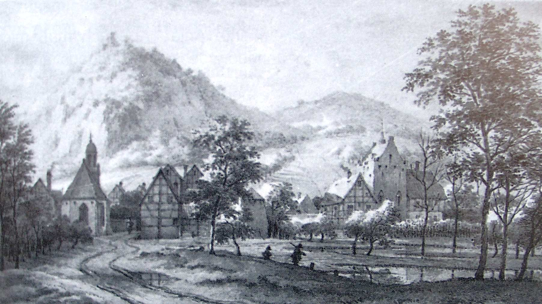 Haus im Turm in Bad Honnef-Rhöndorf im Jahre 1798 vor dem Umbau von 1830